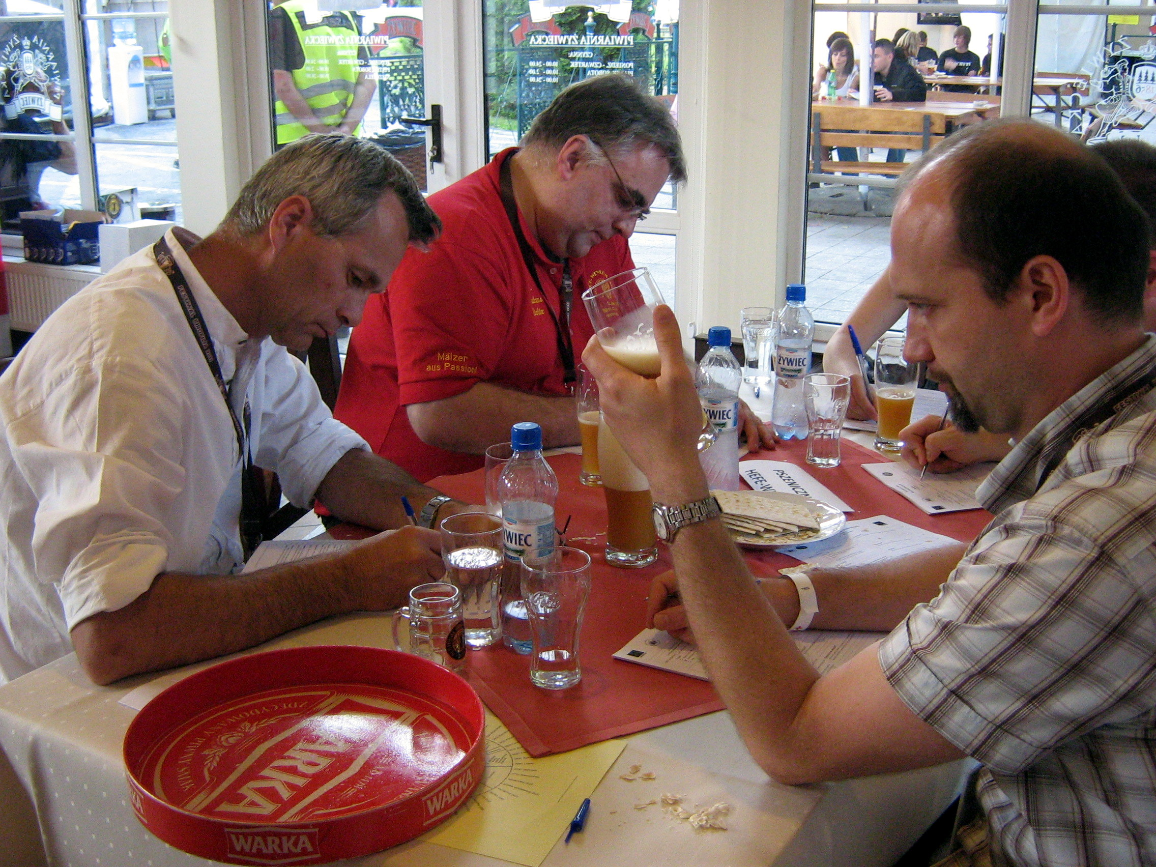 obrady komisji